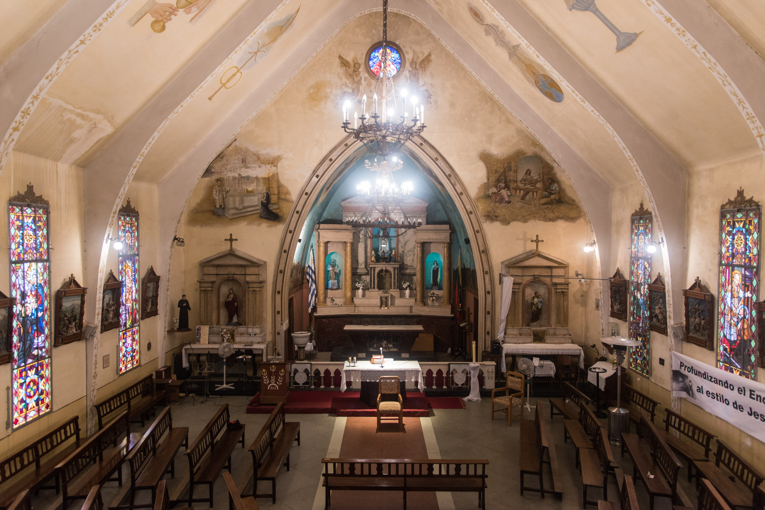 Montevideo Fatimos Nekalčiausios Mergelės Marijos Širdies bažnyčios vidus. Nuotr. Bertos Tilmantaitės